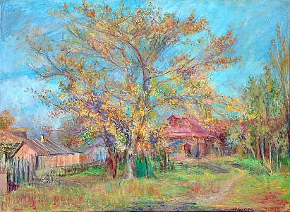 Москва, район Благуша